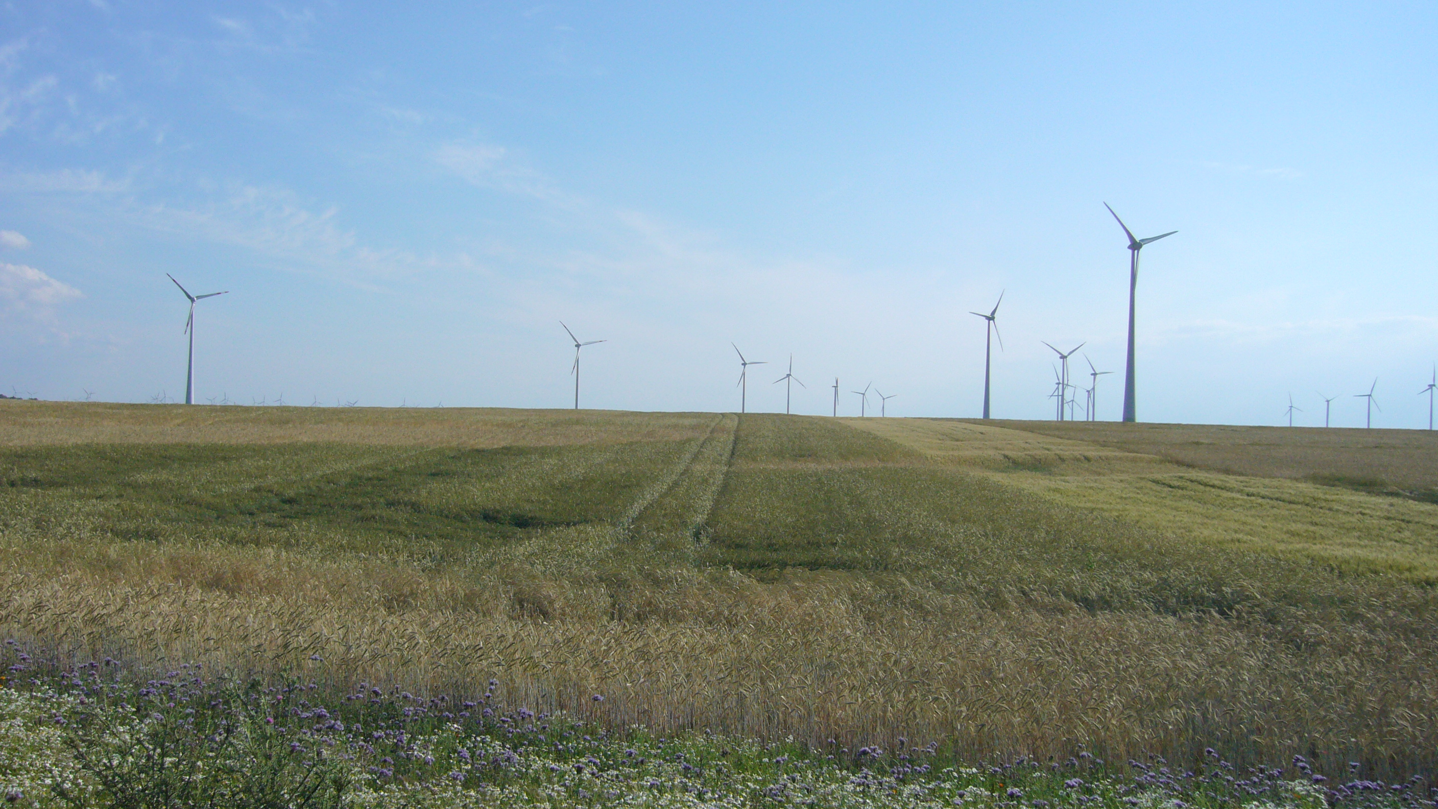 Parndorfer Platte - Windkraftanlage